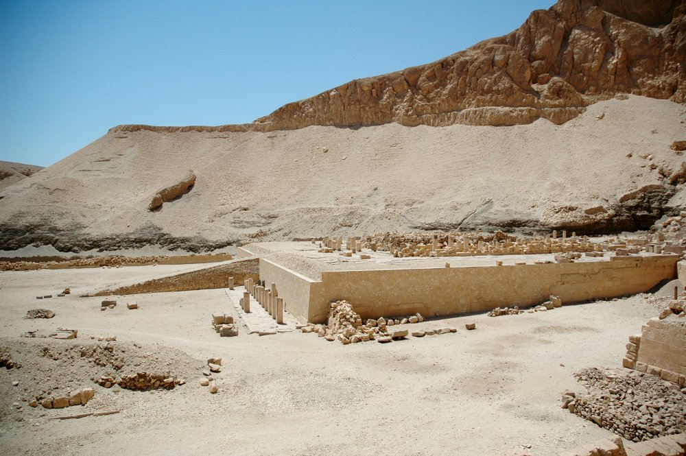 Der Totentempel des Mentuhotep II., vom Hatschepsut-Tempel aus aufgenommen, Deir el-Bahari